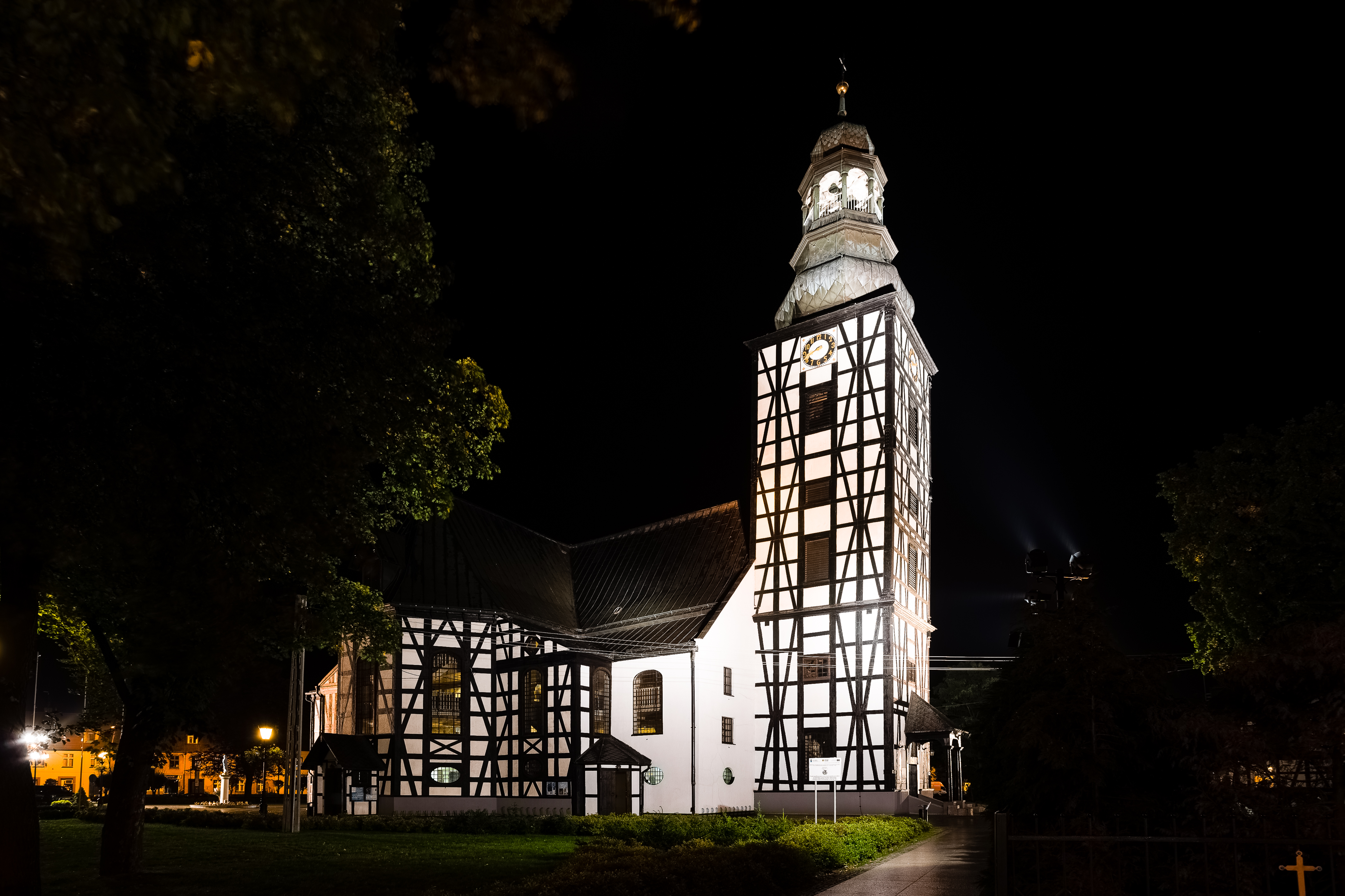 Milicz - dawny kościół ewangelicki (Kościół Łaski), ob. rzym.-kat. pom. pw. św. Andrzeja Boboli